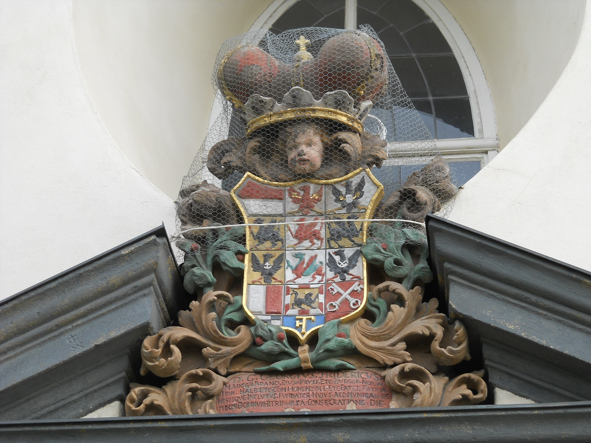 Dittenheim, Gemeinde im mittelfränkischen Landkreis Weißenburg-Gunzenhausen (Bayern), evang.-luth. Pfarrkirche St. Peter und Paul, Markgrafenwappen über dem Eingang an der Südseite